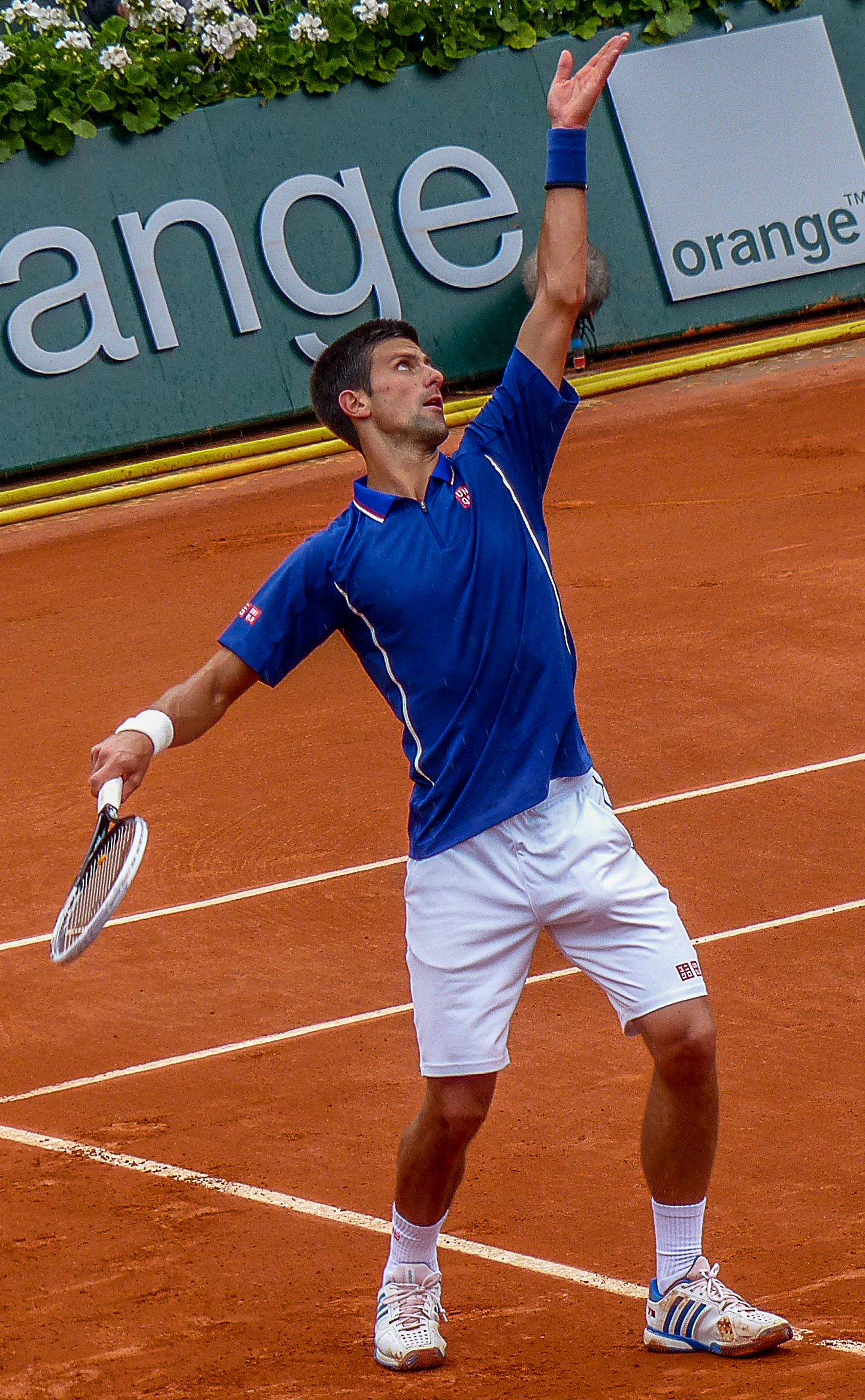 2ème tour Roland Garros 2013 : Novak Djokovic (SRB) def. Guido Pella (ARG)